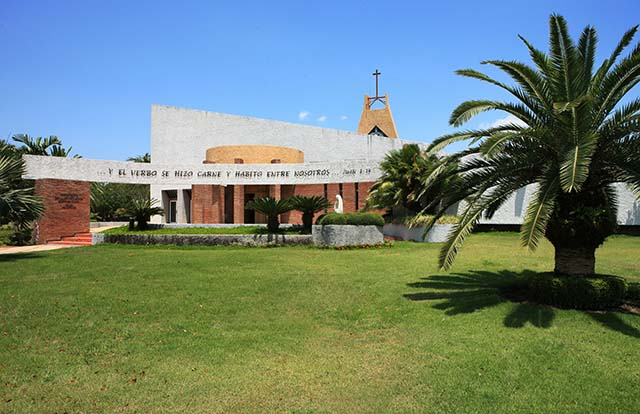 Iglesia de PUCMM, Parroquia La Anunciación, NSDACSTI